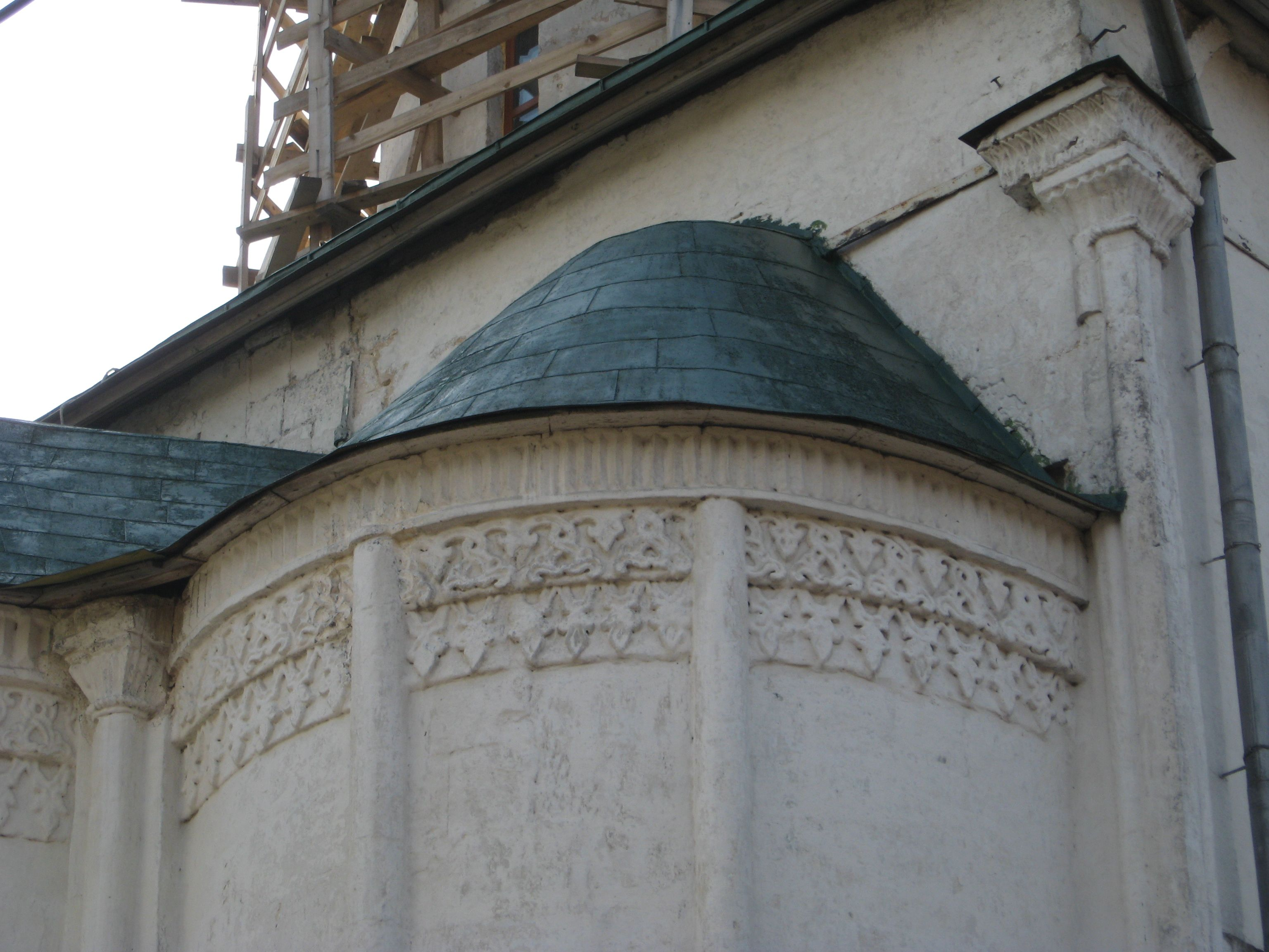 Успенский собор на Городке в Звенигороде. Около 1399 года.